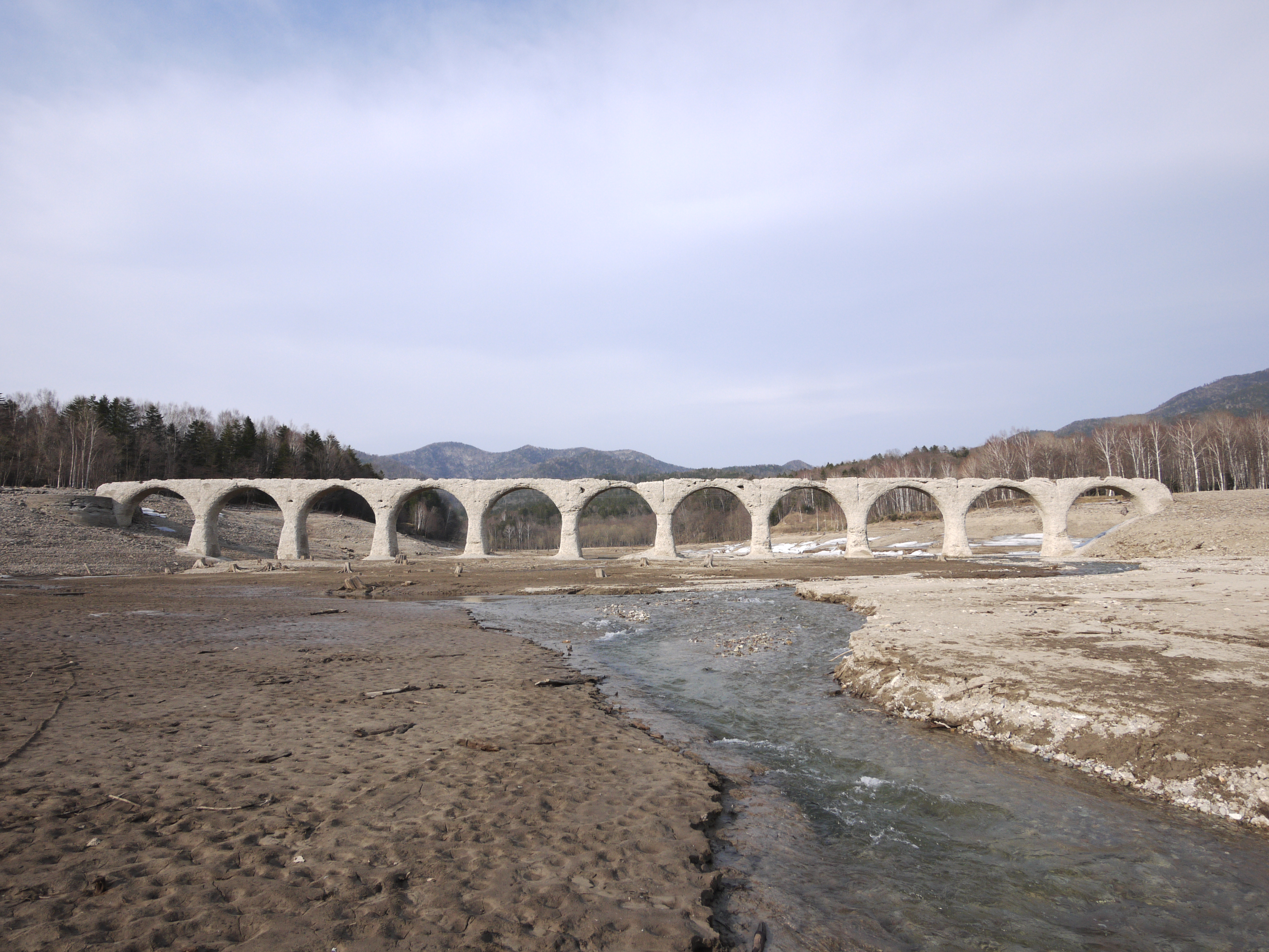 タウシュベツ川橋梁